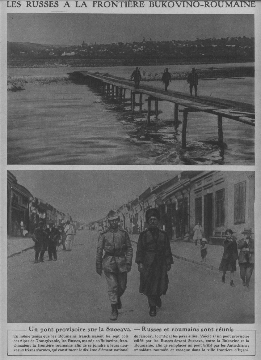 publié dans le journal "le miroir".